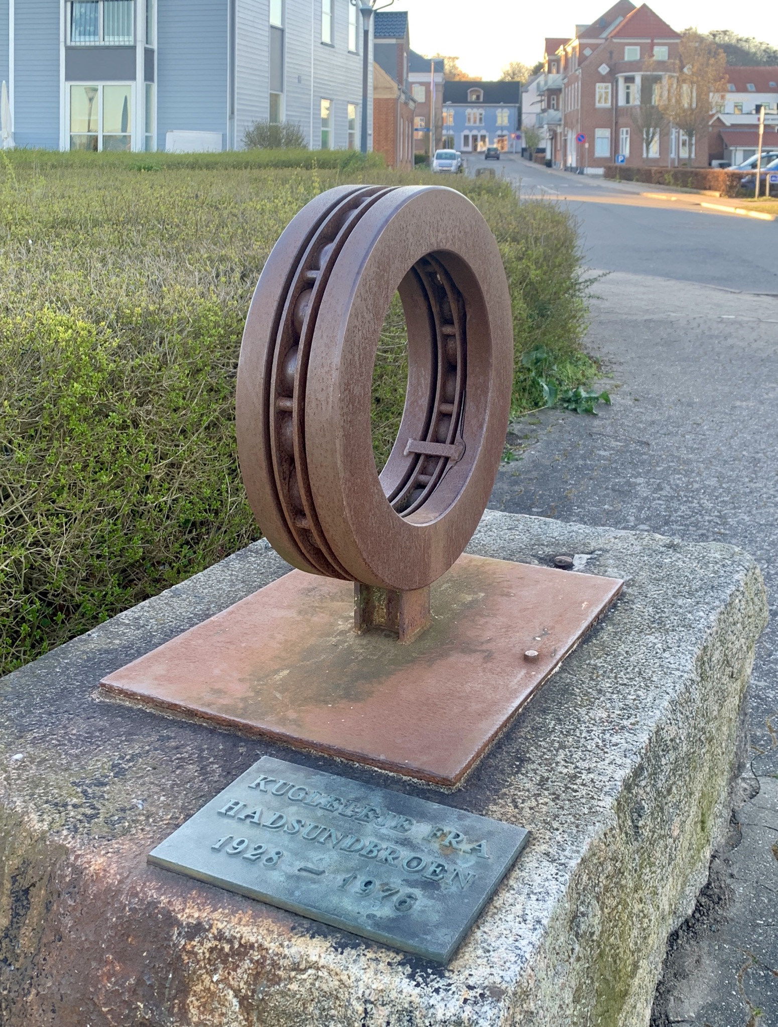 Kuglelejet fra den gamle Hadsundbro. Kuglelejet blev opstillet få år efter den nye Hadsundbro stod færdig, den er opstillet 20 meter vest for den nye Hadsundbro. Kuglelejet blev opstillet til minde om den gamel bro over Mariager Fjord.